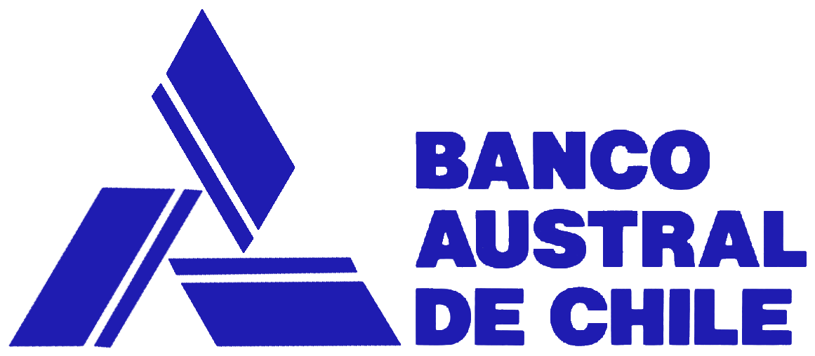 Emblema del Banco Austral de Chile hasta 1981.